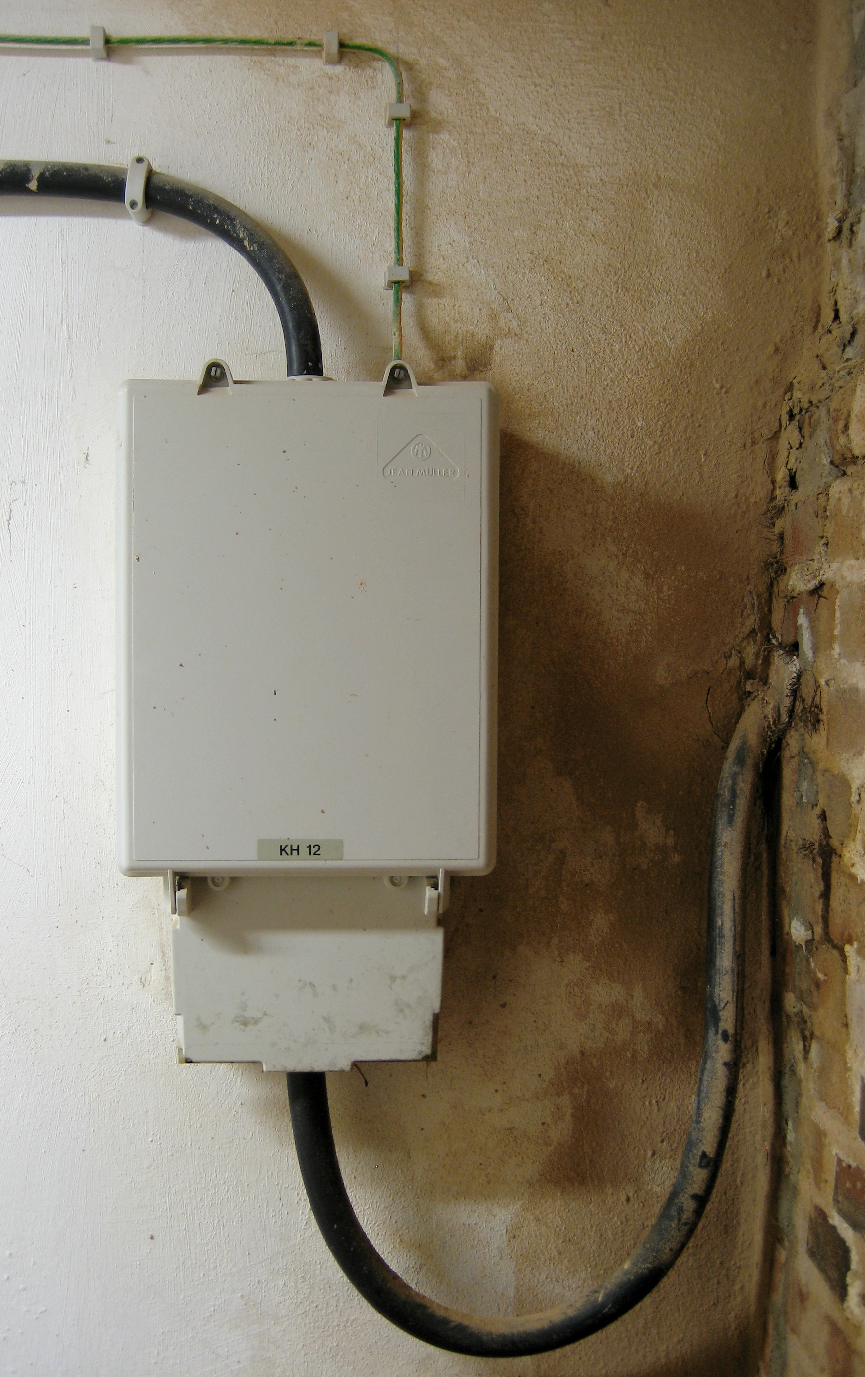 Hausanschlusskasten